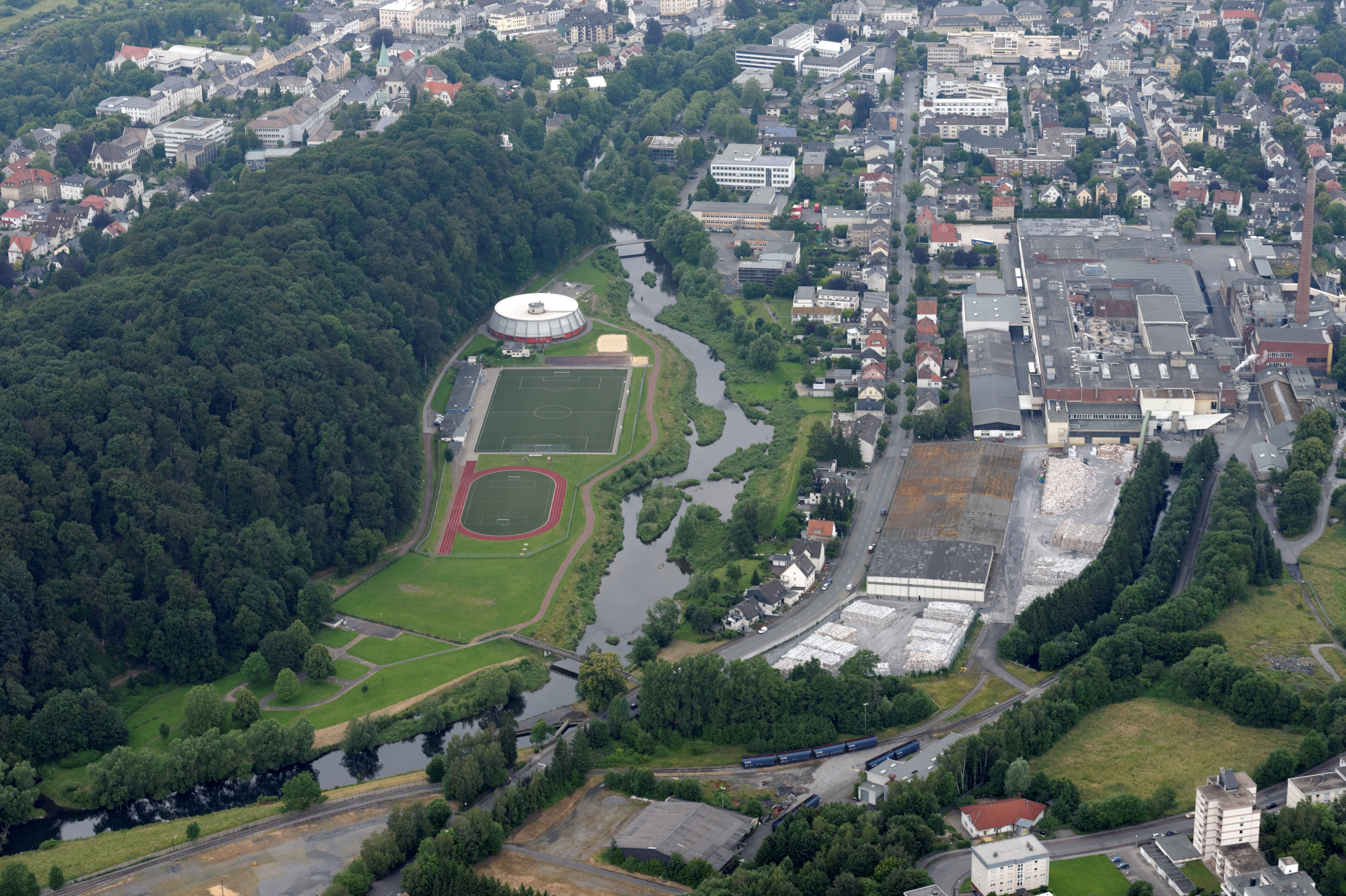 Arnsberg: Neustadt mit Werk Reno de Medici, Hellefelderstraße, Schulzentrum Realschule am Eichholz, Sekundarsschule, Berufskolleg, teilweise renatuierte Ruhr, Sportanlagen mit Rundturmhalle und Eichholz; Ruhr im „Naturschutzgebiet Ruhrtal“, Wald links im Naturschutzgebiet „Eichholz“ (Fotoflug Sauerland Nord)